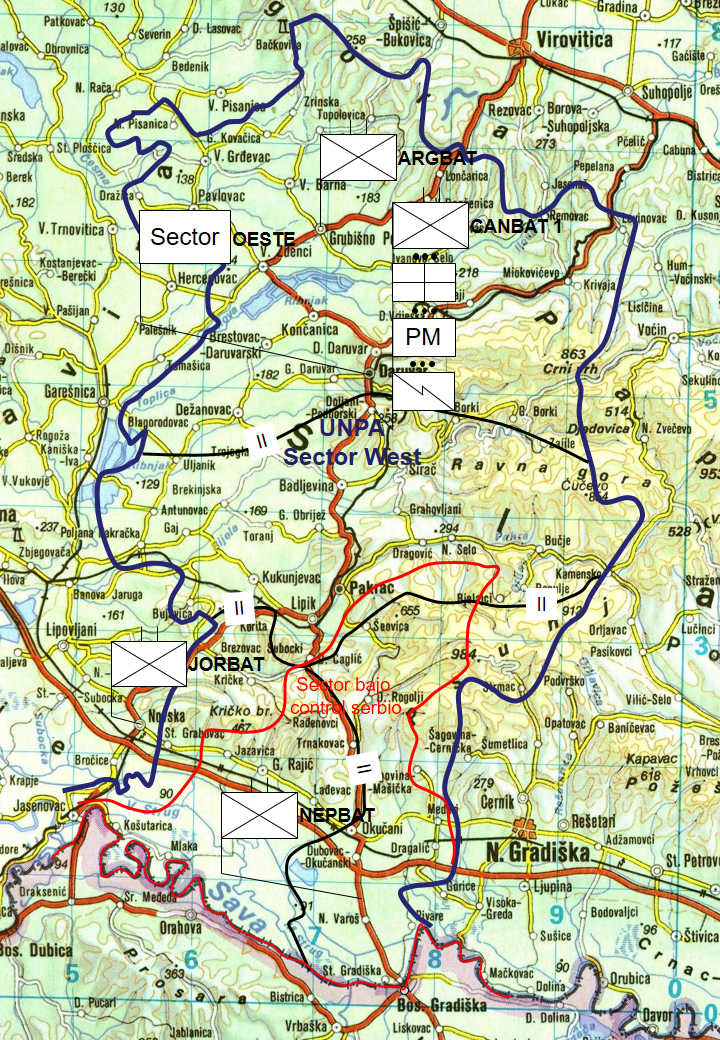 Confeccionado sobre la base de: Servicio Histórico del Ejército. El Ejército Argentino y las Operaciones de Mantenimiento de la Paz. UNPROFOR. Volumen V. Pag 52 y ss.